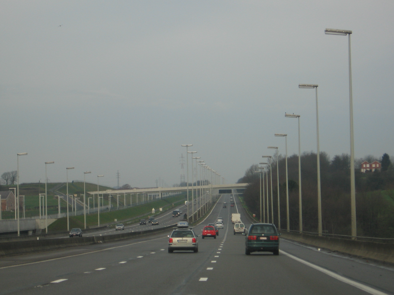 A3 near Verviers